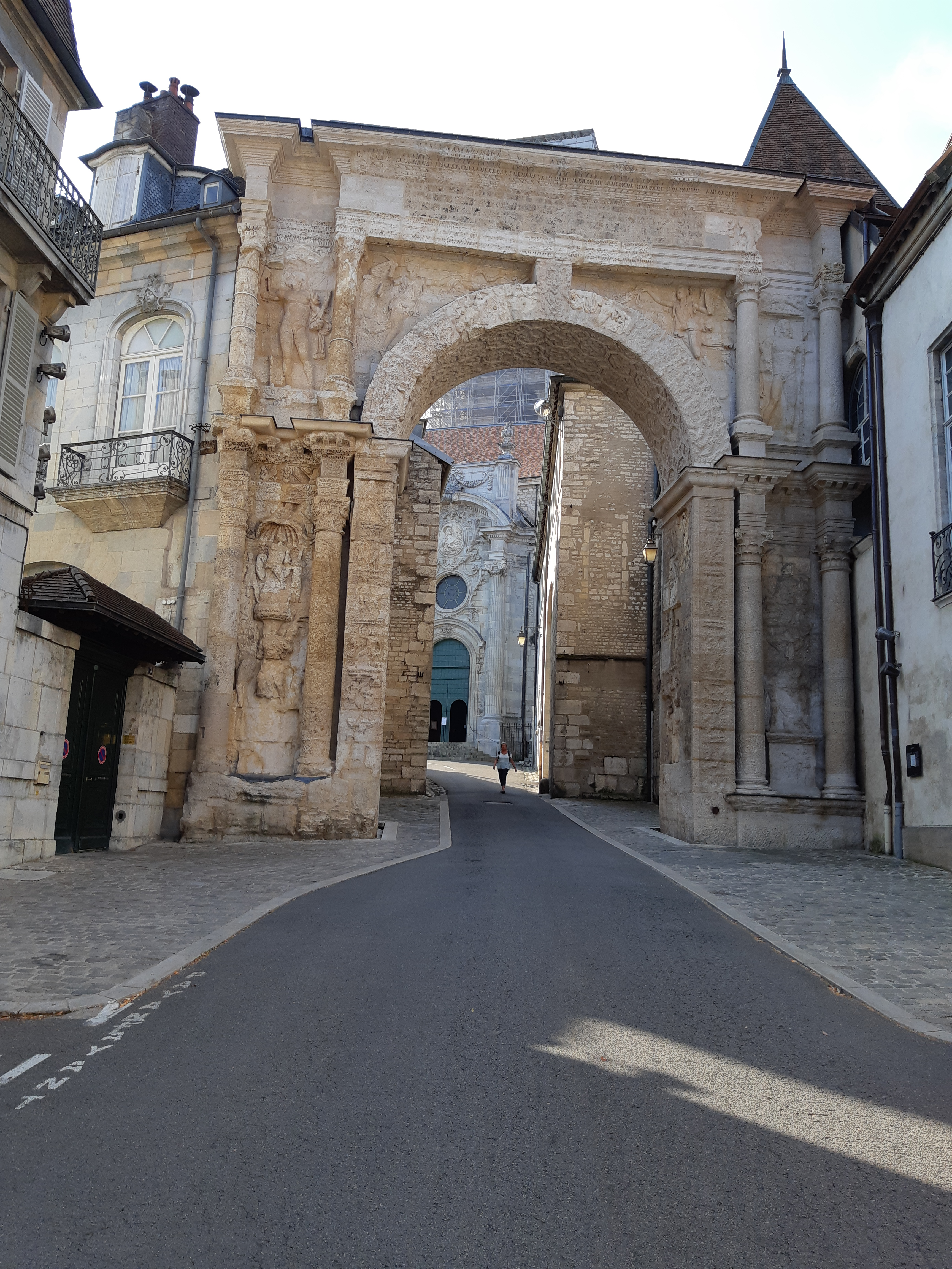 Porte Noire, in Besançon (France)